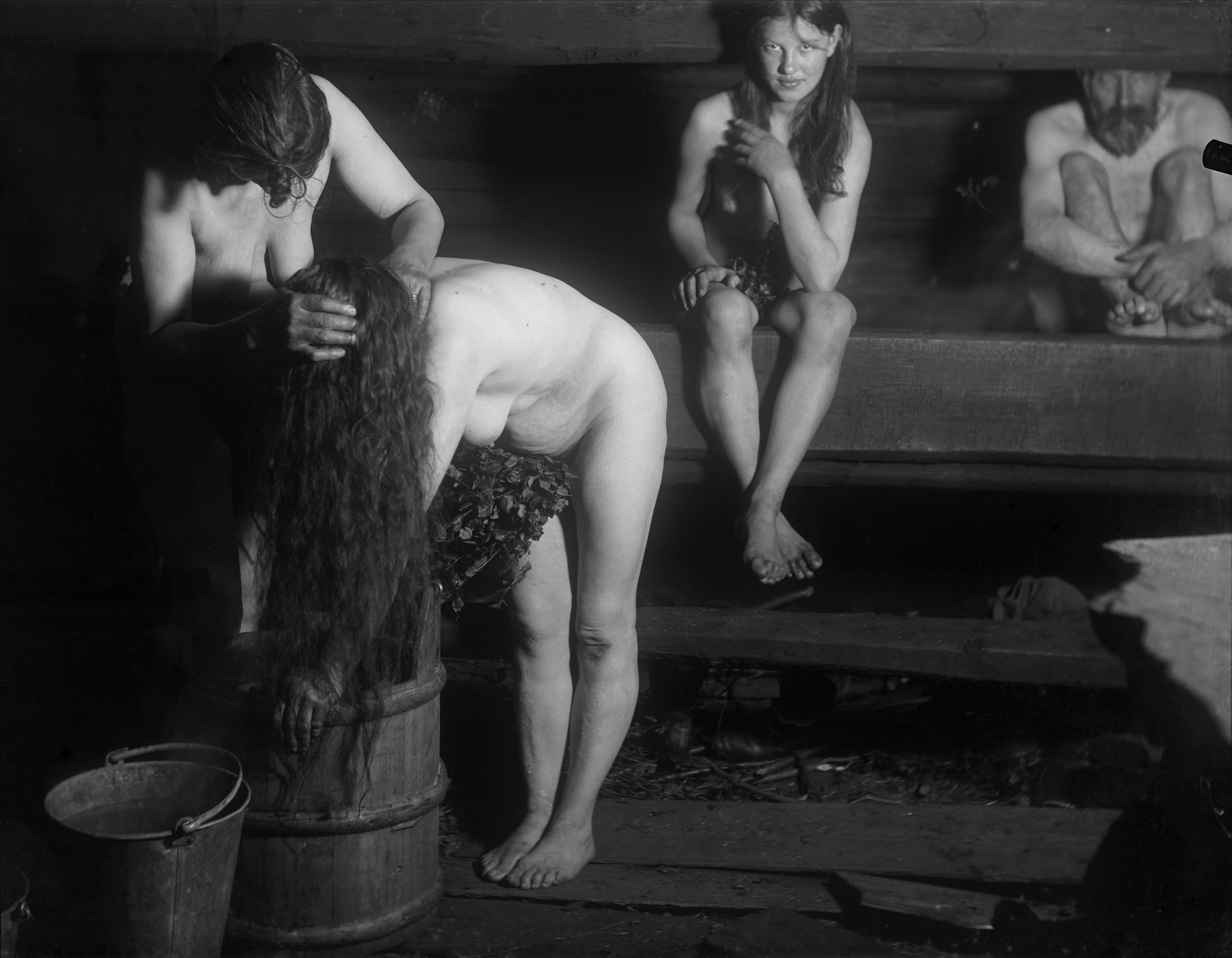 Bastubad. En man och tre kvinnor i bastun. En kvinna kammar en annan kvinnas hår. Bjurbäcken, Mangskogs sn, Värmland.